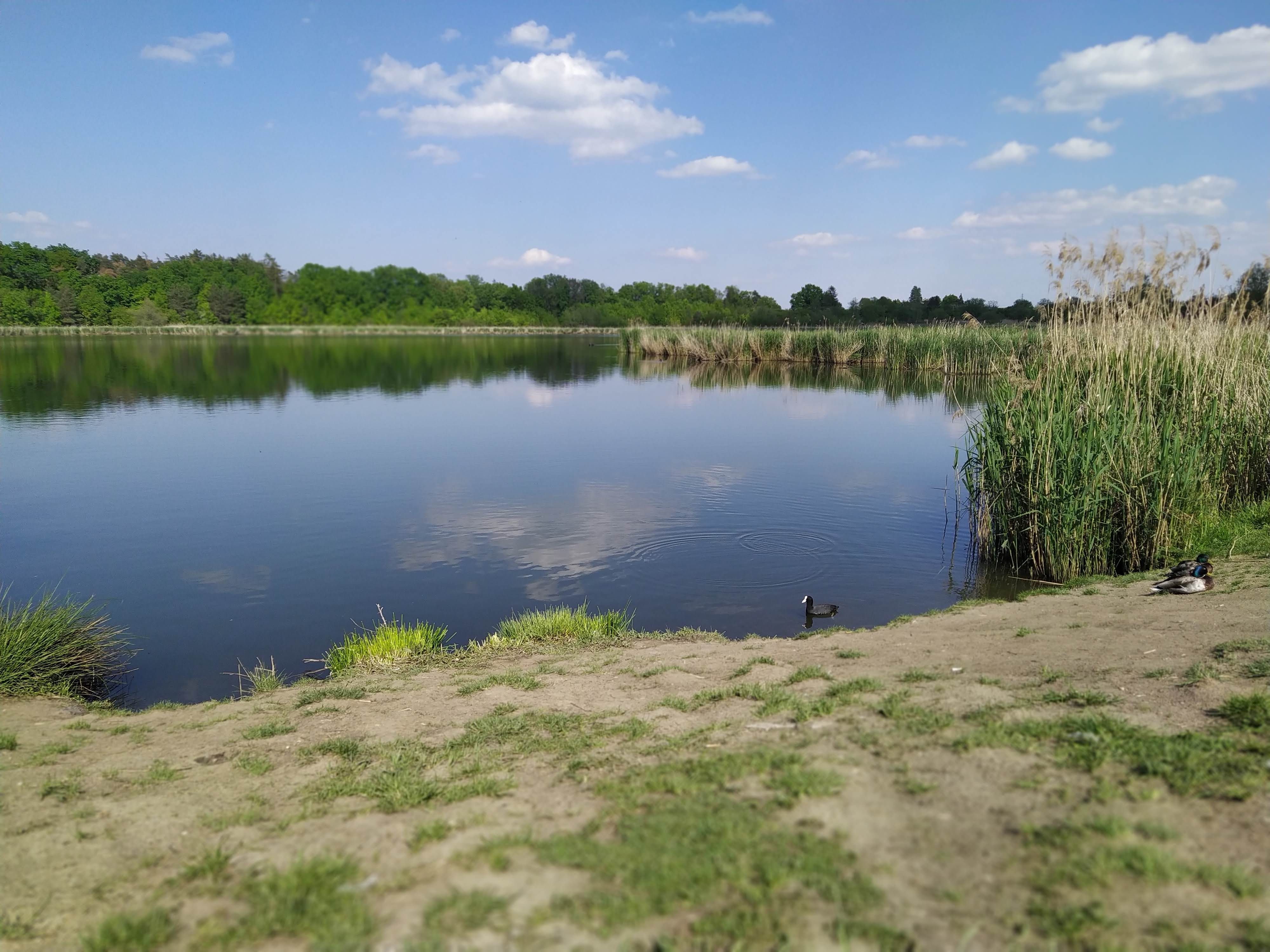 Retenční nádrž Slatina v Praze-Dubči. Česká republika.